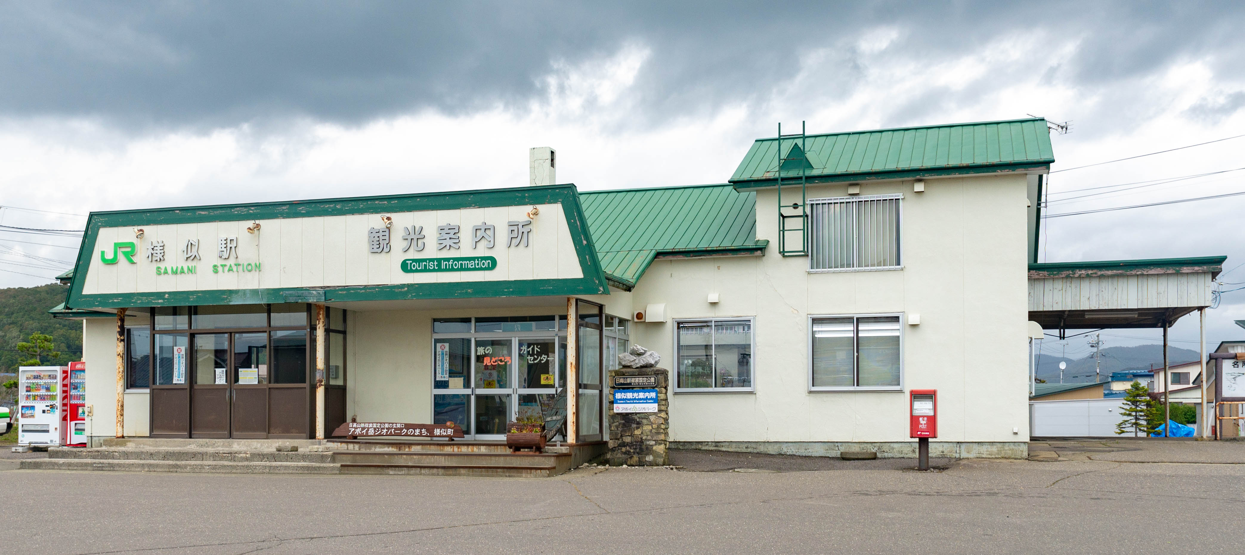 北海道旅客鉄道株式会社日高本線様似駅駅舎